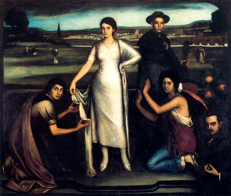 Nuestra Señora de Andalucía, de Julio Romero de Torres. 1907. Óleo y temple sobre lienzo. Expuesto en el Museo Julio Romero de Torres de Córdoba, (España).